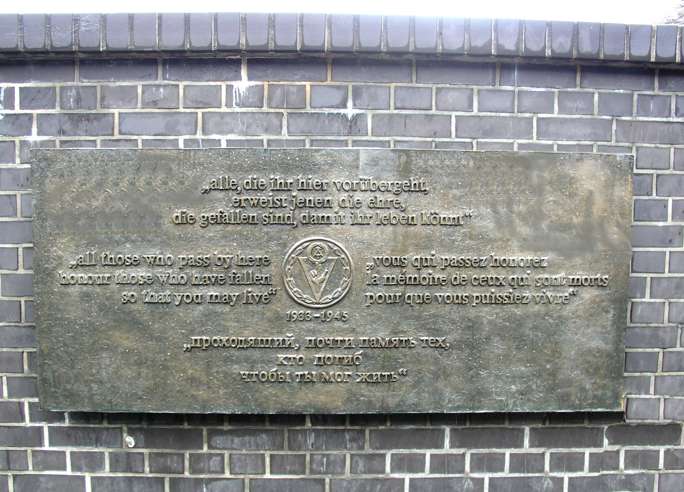 Gedenktafeln - Aufruf, in der Schönhauser Allee, Berlin, von Günter Schütz, DDR 1985/86